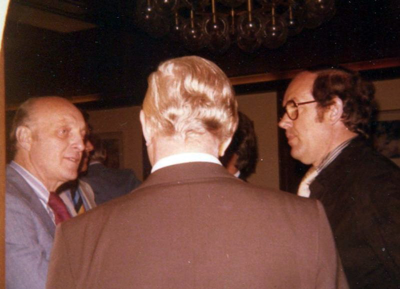 Innensenator Werner Staak (rechts) im Gepräch mit NDR-Journalist Horst Seifart im SPD-Arbeitskreis Sport in Hamburg